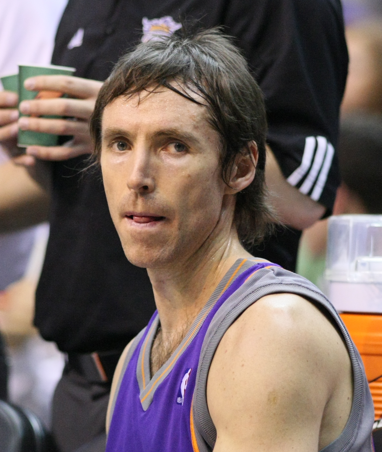 El jugador canadiense de baloncesto Steve Nash.